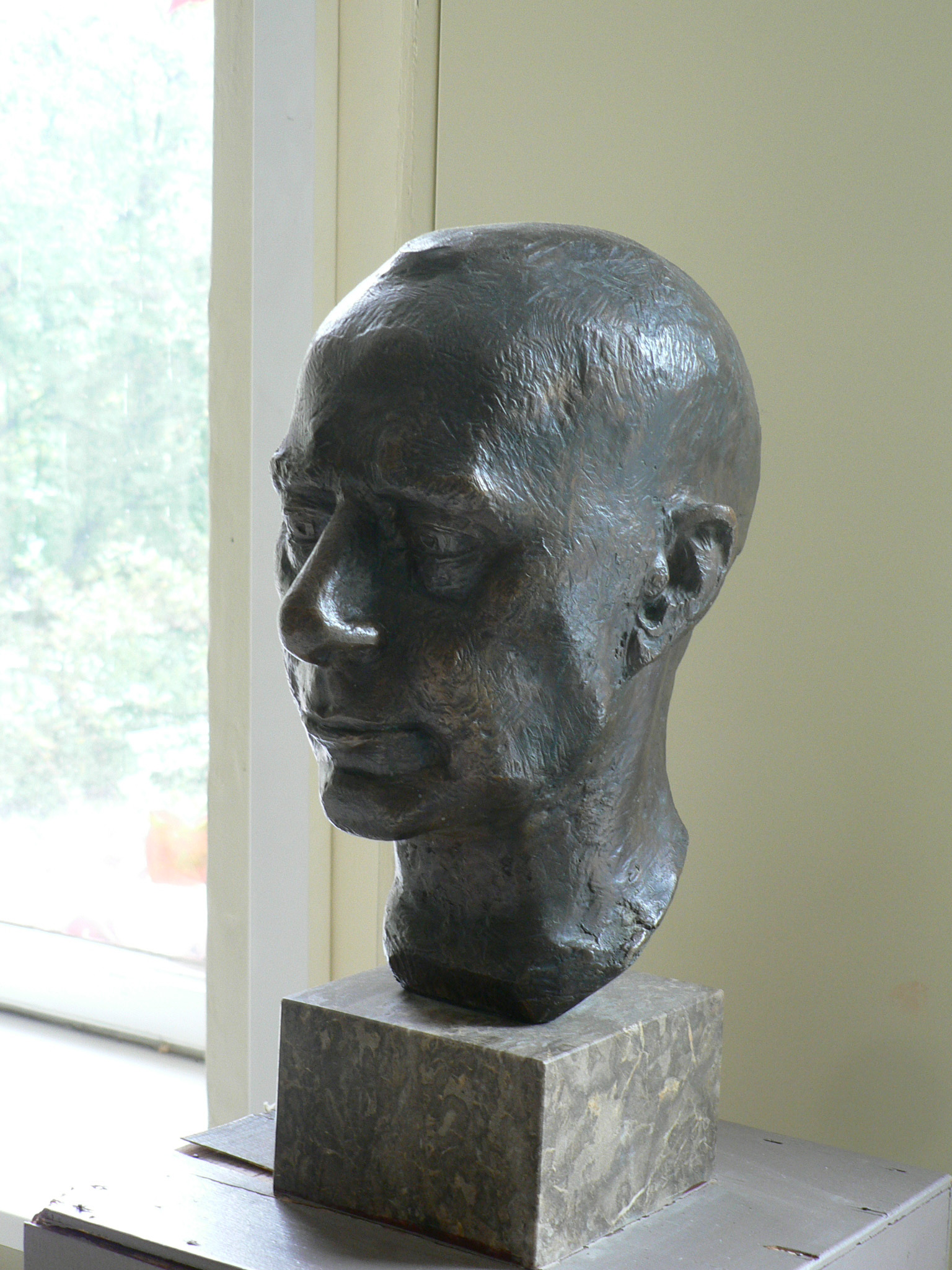 Büste des Diabetologen Gerhardt Katsch (1887-1961) im Hörsaal II der Medizinischen Klinik des Universitätsklinikums Greifswald; weitere identische Ausfertigungen befinden sich freistehend und frei zugänglich im Park des Schlosses Karlsburg bei Greifswald und vor dem ehemaligen Feriendomizil von Gerhardt Katsch in Hochweiler